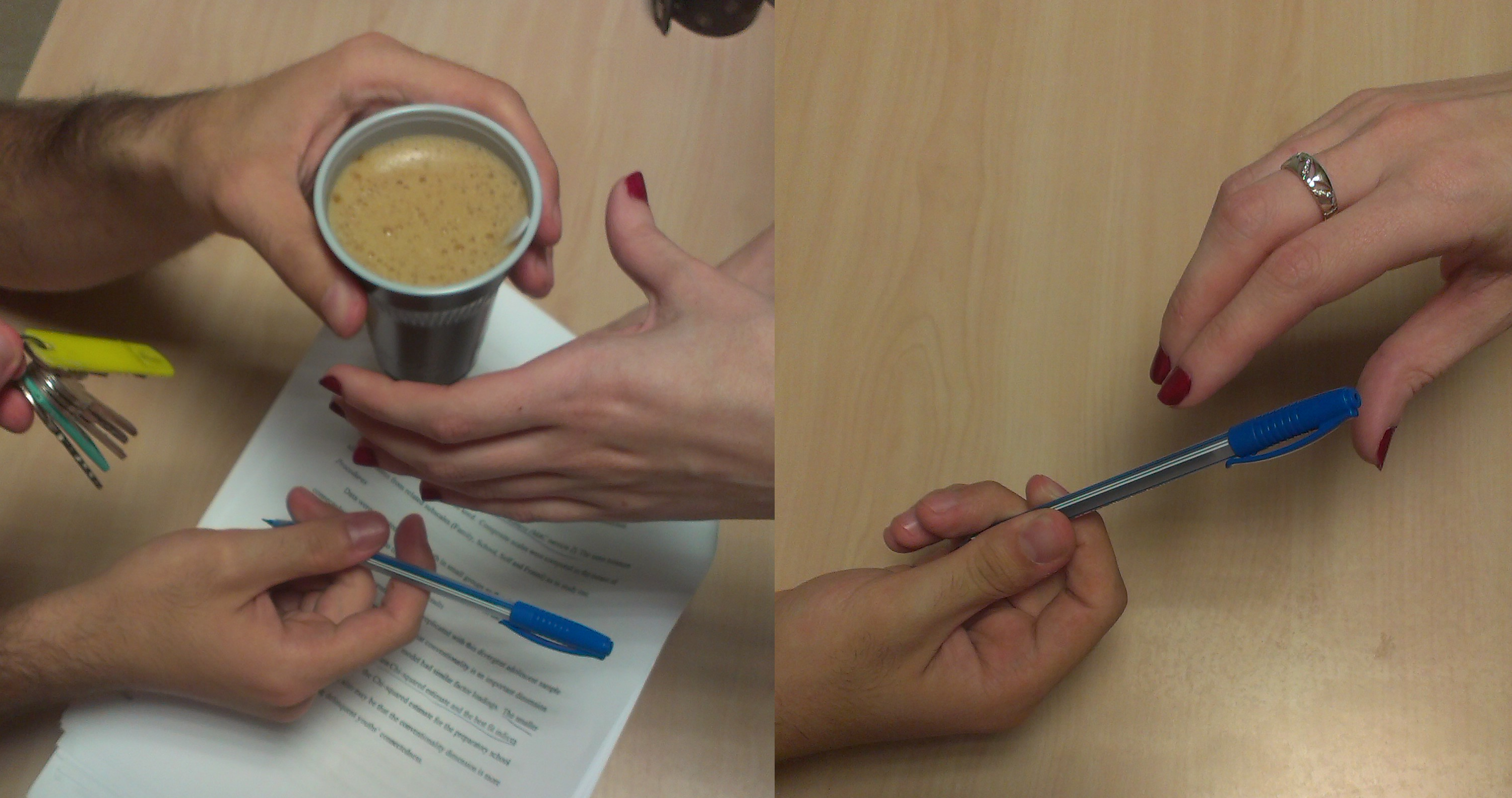 polikronične in monikronične kultureSlovenščina: Za polikronične kulture (levo) je značilno osredotočanje na več dejavnosti hkrati, za monokronične kulture (desno) pa na eno dejavnost ob določenem času.